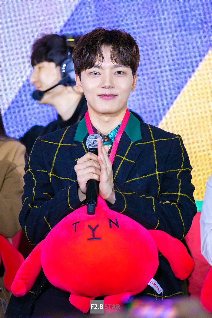 20191215 여진구 tvn 즐거움전 델루나